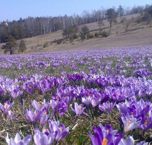 Divčibare Biljni Svet